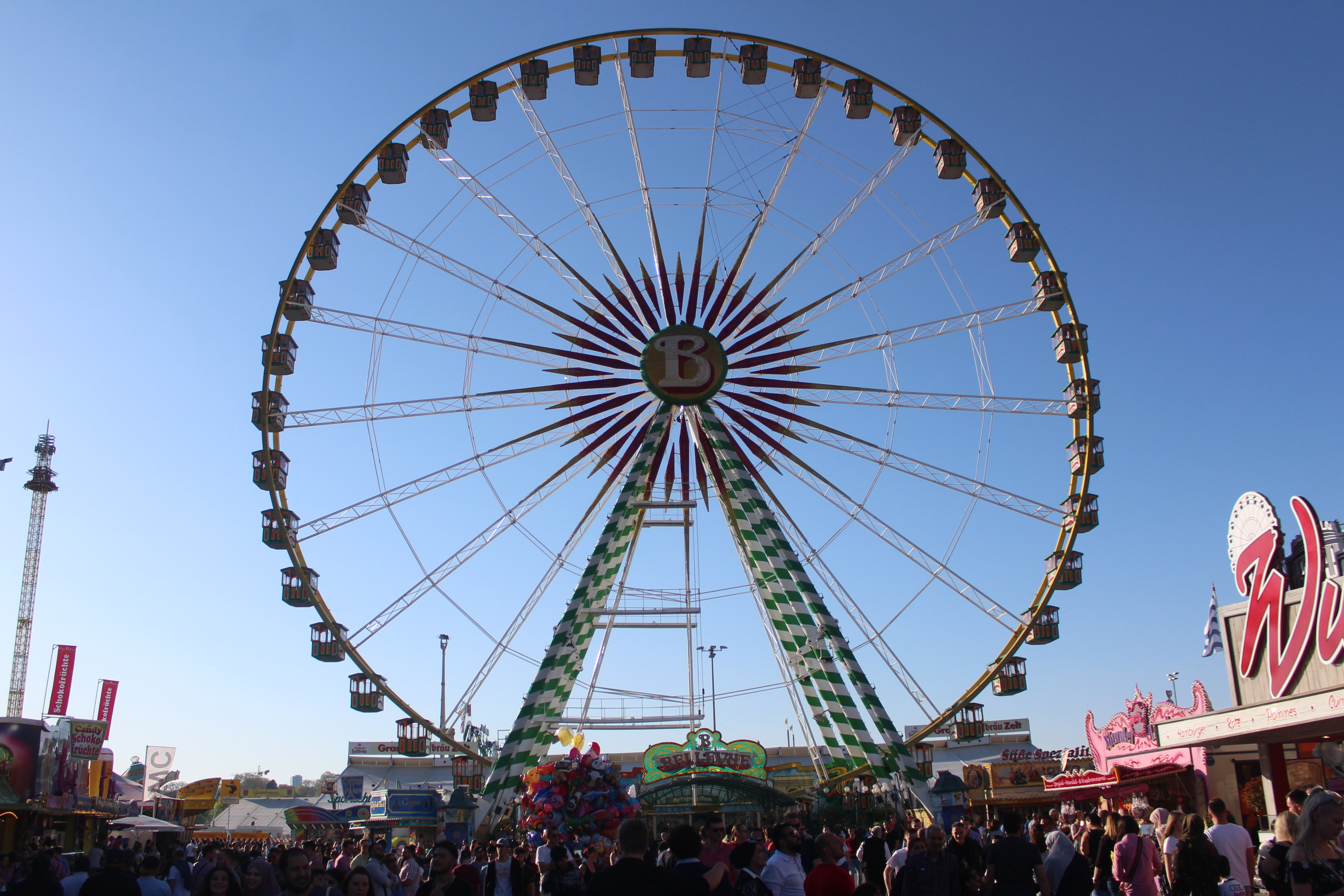 Riesenrad des Stuttgarter Frühlingsfestes 2019